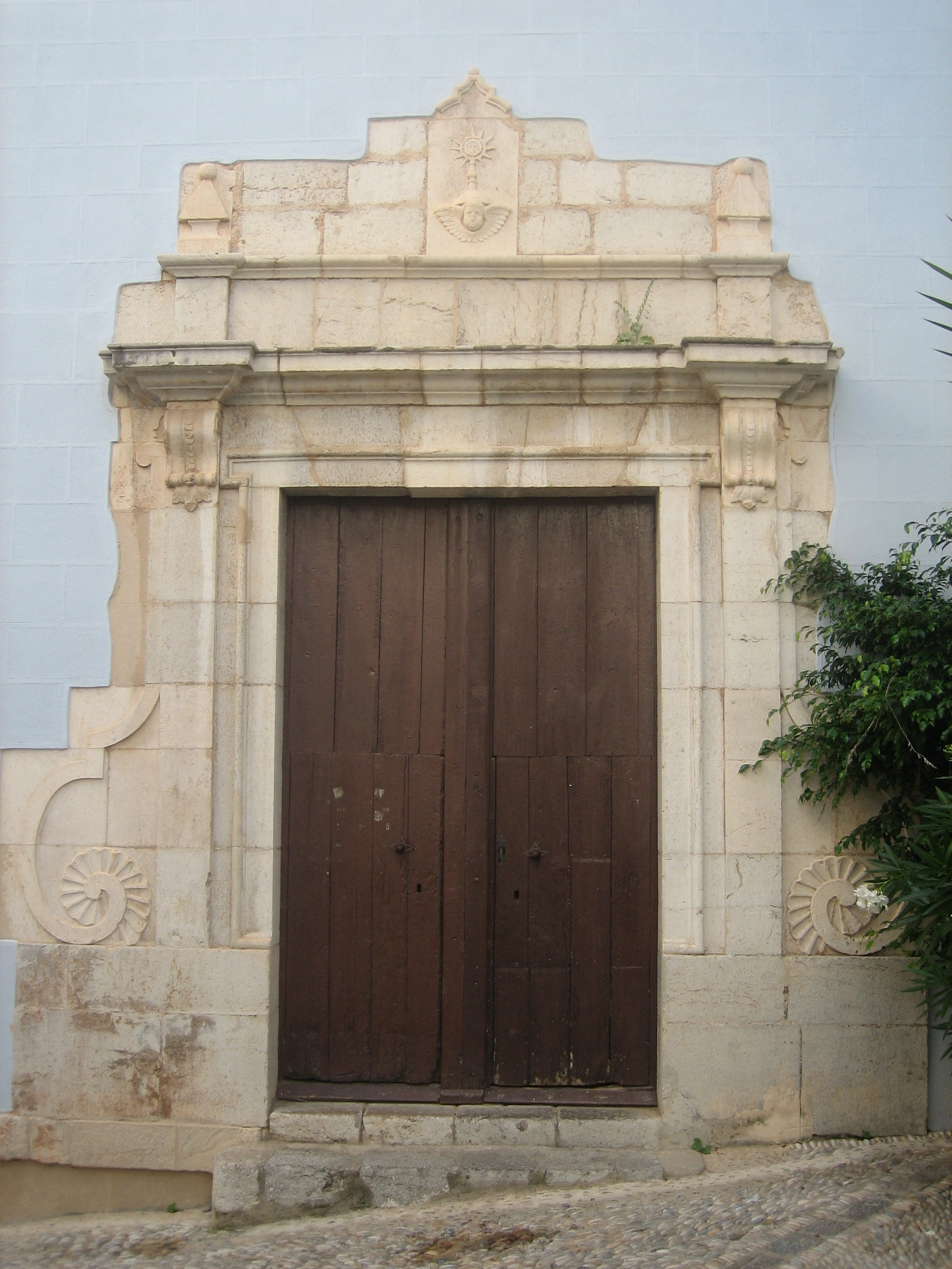 Portada de la capella de la Comunió de l'església de Santa Maria de Peníscola (Baix Maestrat)